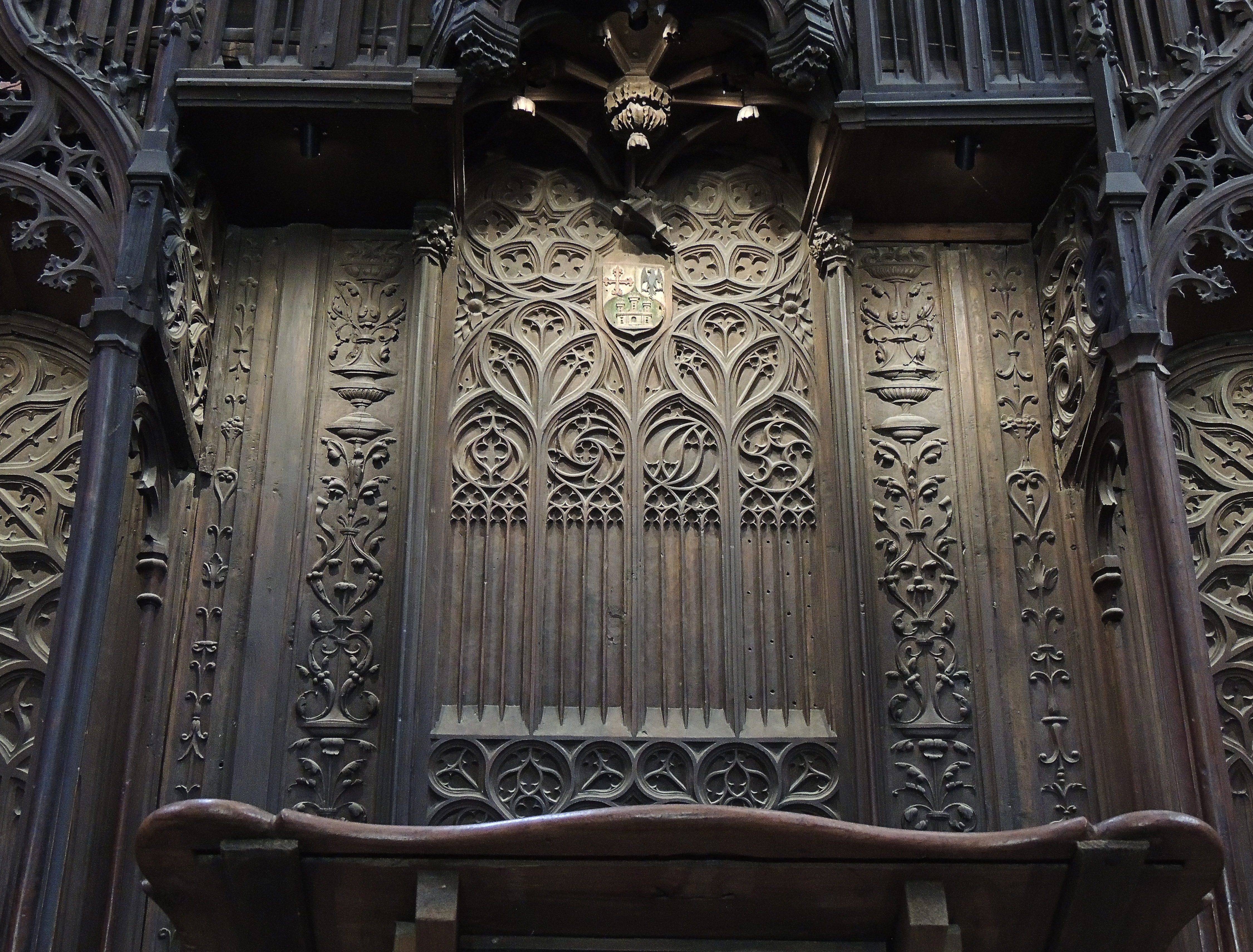 Silla episcopal de Juan Arias Dávila en el coro de la catedral de Segovia Segovia Cathedral Native nameCatedral de Santa María de SegoviaLocationSegovia , (Spain)Coordinates40° 57′ 00.65″ N, 4° 07′ 32.24″ W EstablishedMiddle AgeWeb page control : Q1499912 VIAF: 151939123 ISNI: 0000 0001 0672 8869 LCCN: n81124924 NLA: 36562756 BIC: RI-51-0000862 WorldCat institution QS:P195,Q1499912